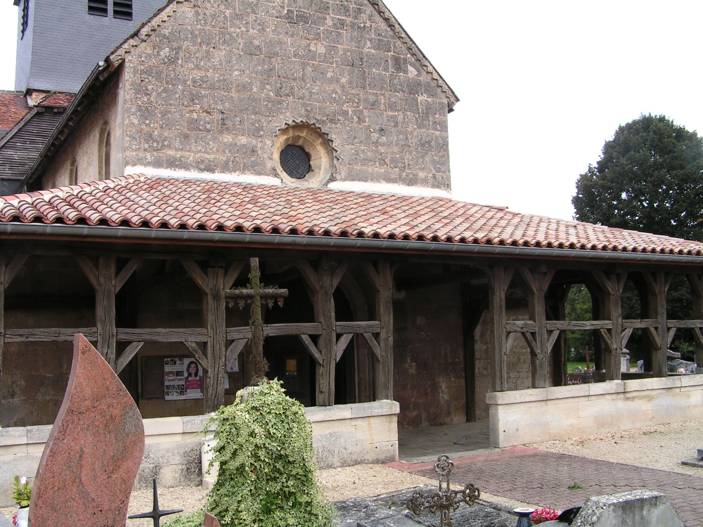 Église Saint-Georges de Larzicourt (Classé) .